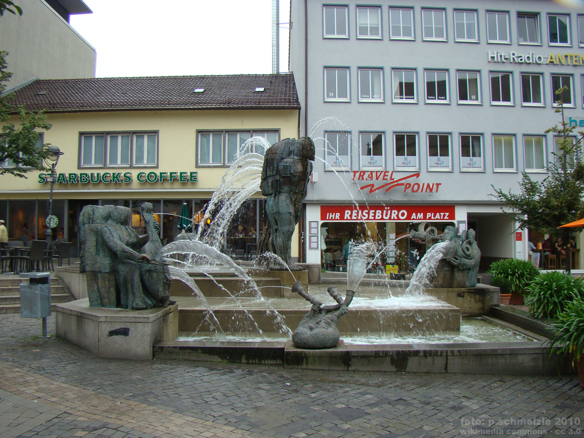 Neuer Stadtbrunnen (Komödiantenbrunnen) am Kiliansplatz in Heilbronn.